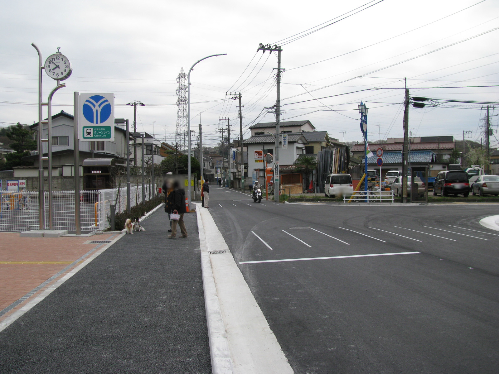 横浜市営地下鉄グリーンライン高田駅